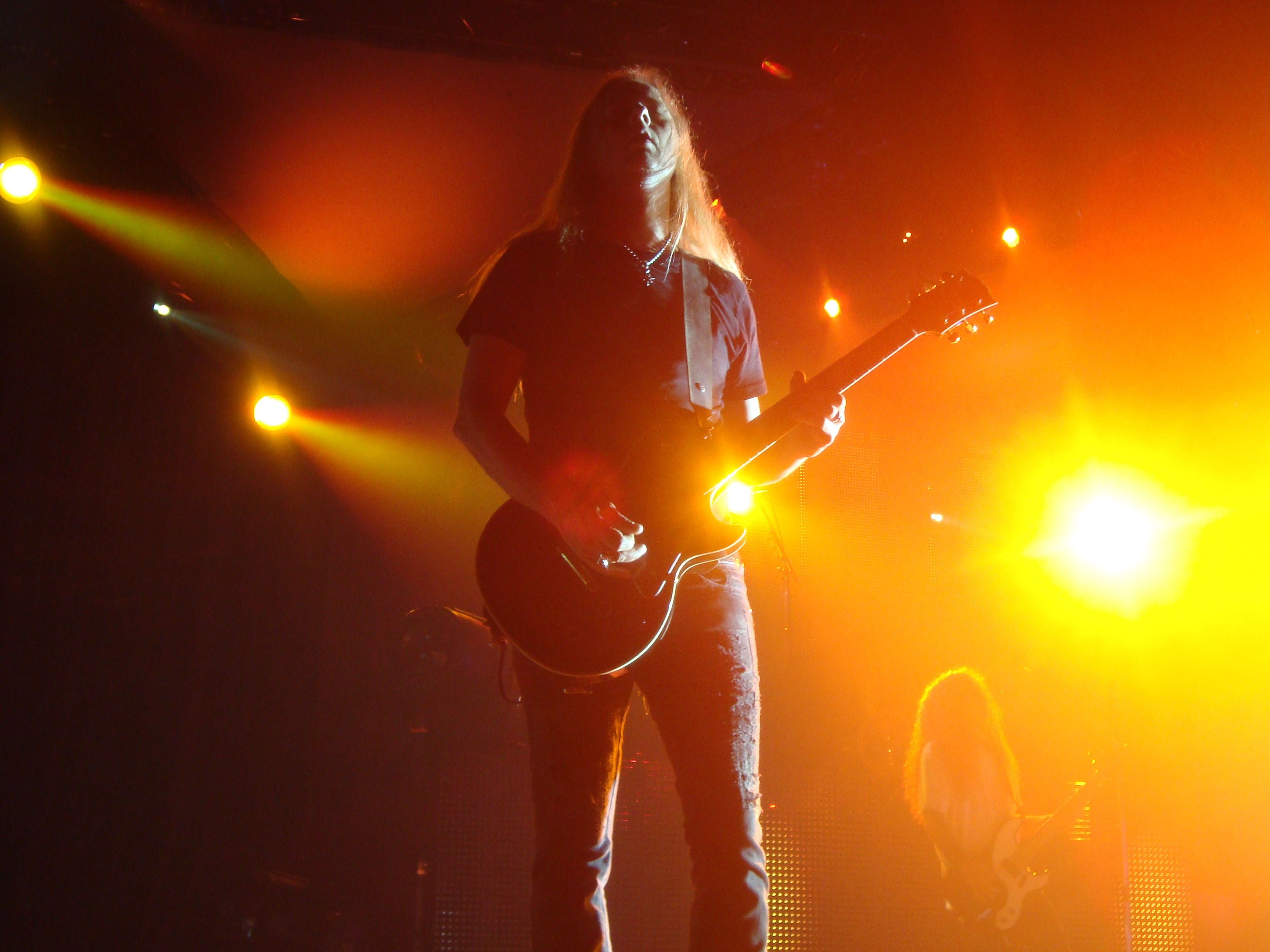 Jerry Cantrell under en Alice in Chains-koncert i San Jose, oktober 2010.